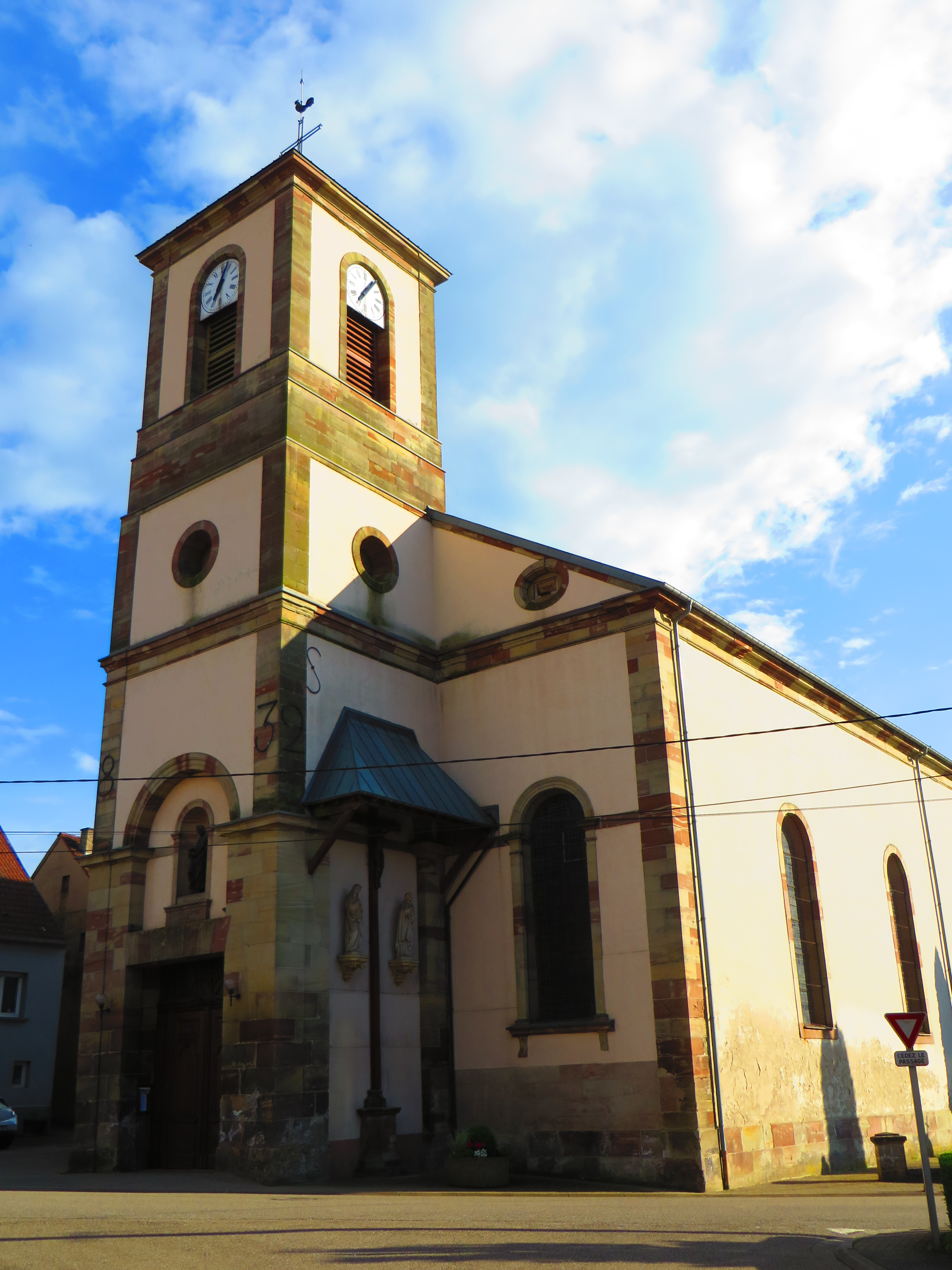 Wiesviller Église Saint-Barthélemy